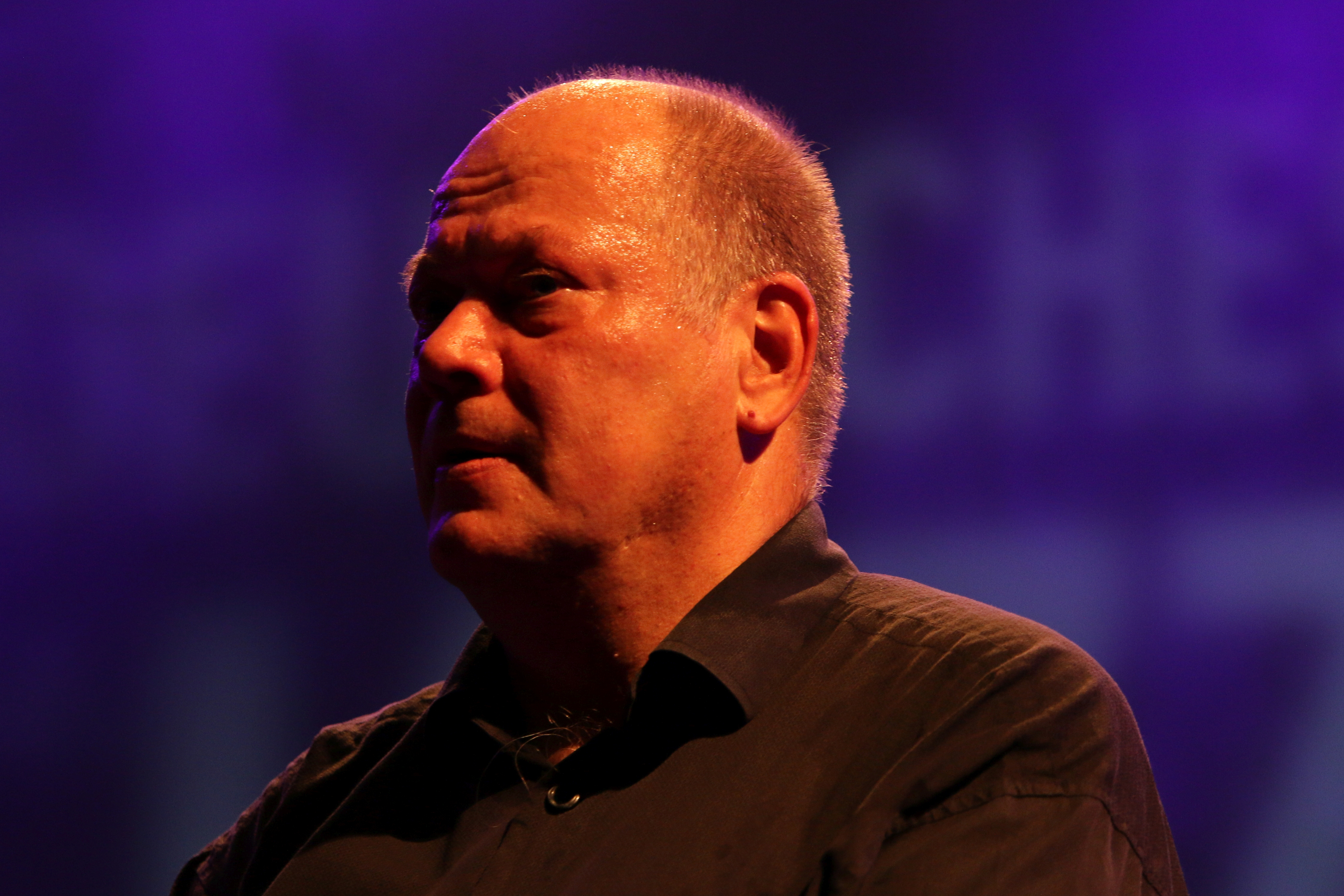 46. Deutsches Jazzfestival Frankfurt 2015: hr-Bigband: Christoph Cech